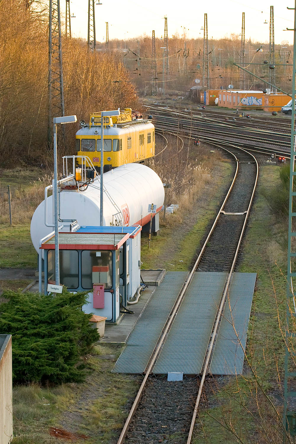 An einem Gleis des 1960 aufgelösten Bahnbetriebswerkes Lüneburg betreibt die DB Netz eine Tankstelle und eine Wasserfüllanlage. Im Hintergrund ist ein Turmtriebwagen der Betriebswerkstatt Lüneburg abgestellt.